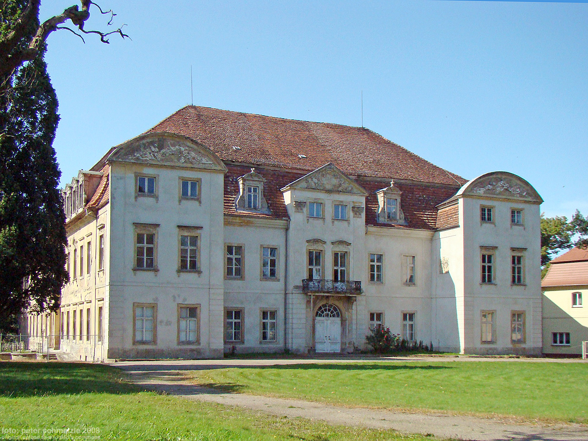 Schloss Ivenack, Ansicht von Südosten